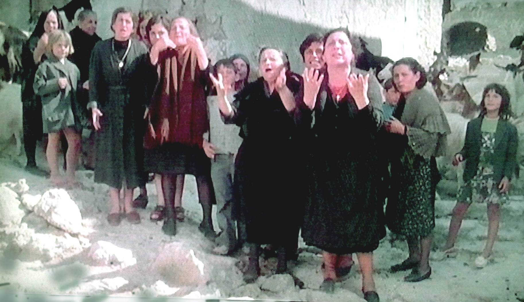 Una scena tratta da "Gente di rispetto" (Zampa, 1975)